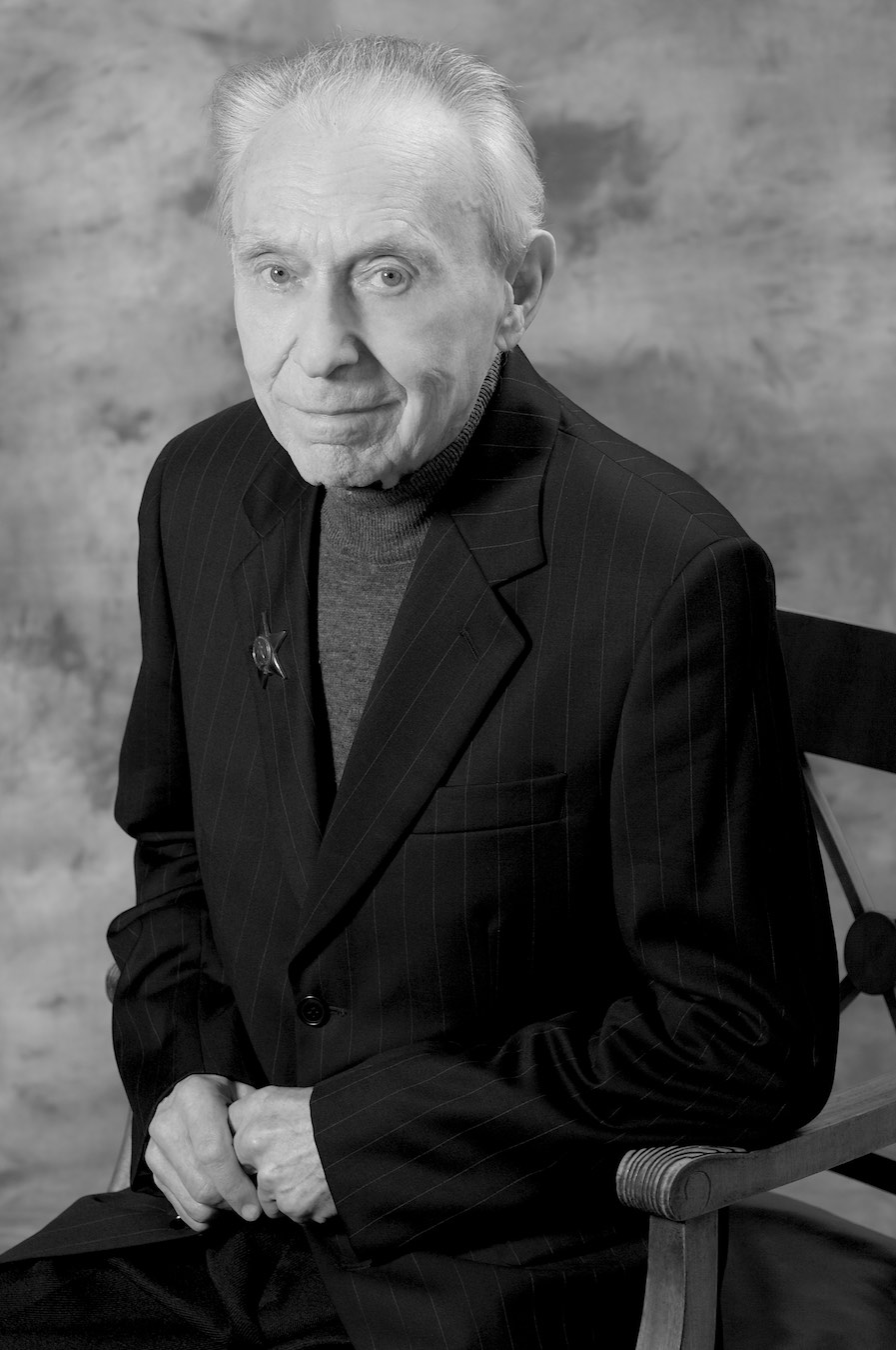 Пионер советской вычислительной техники Николай Петрович Брусенцов. В 1958 году разработал в МГУ первый в мире троичный миникомпьютер Сетунь.